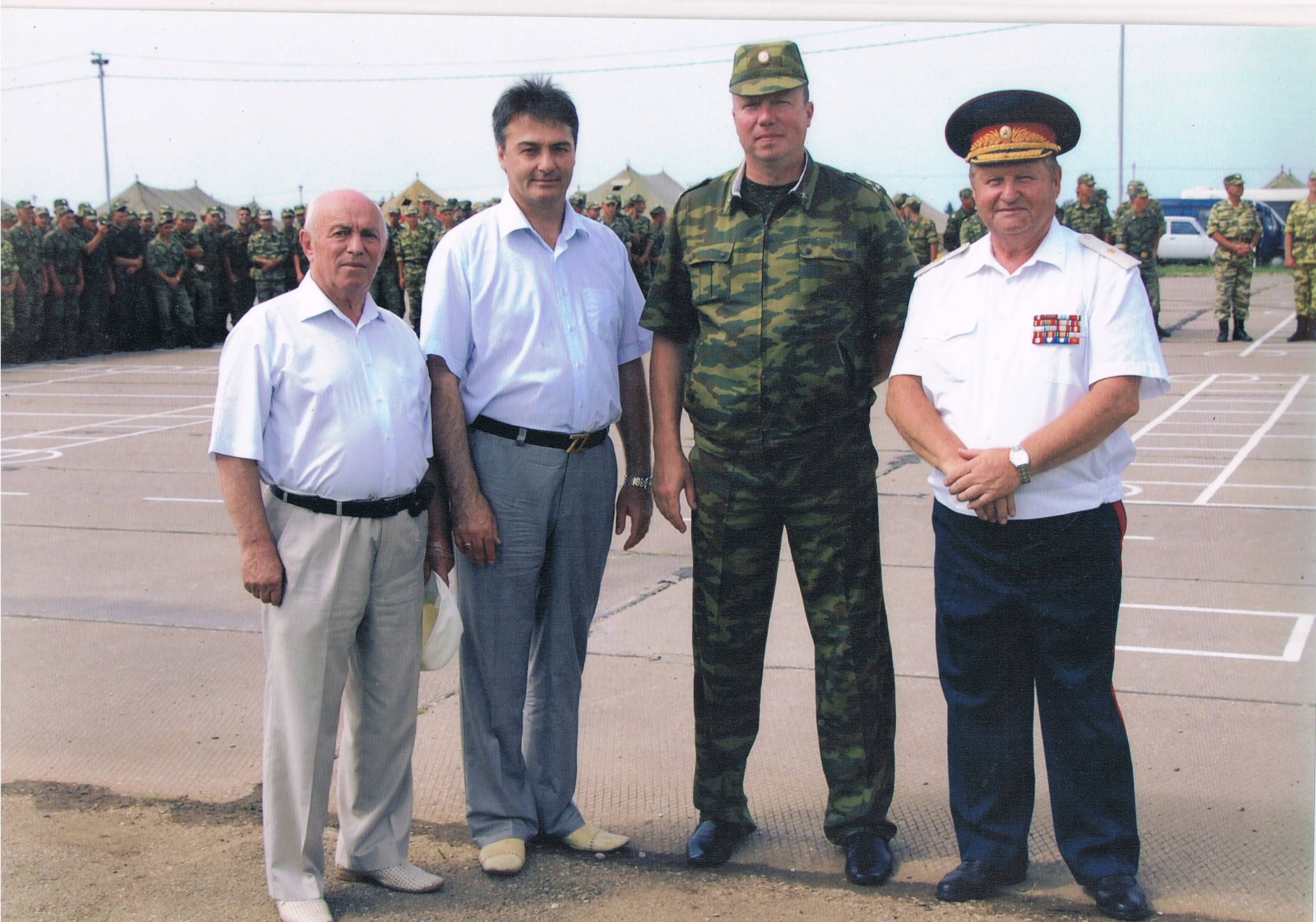 131-й осмбр-91 год.Абхазия, Гудаута. 2009 год.Ветераны генерал Дорофеев А.А., Рудяк Л.С., Тхакушинов Р.К. с комбригом Чеботарёвым С. В. в бригаде.